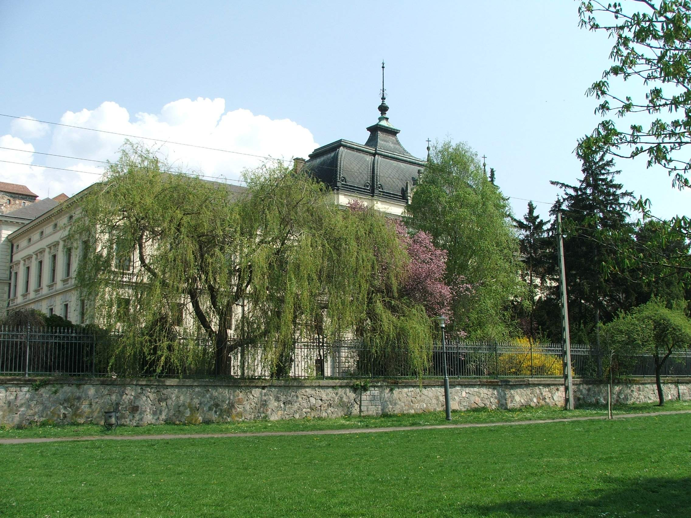 A prímási palota Erzsébet-parki kerítése